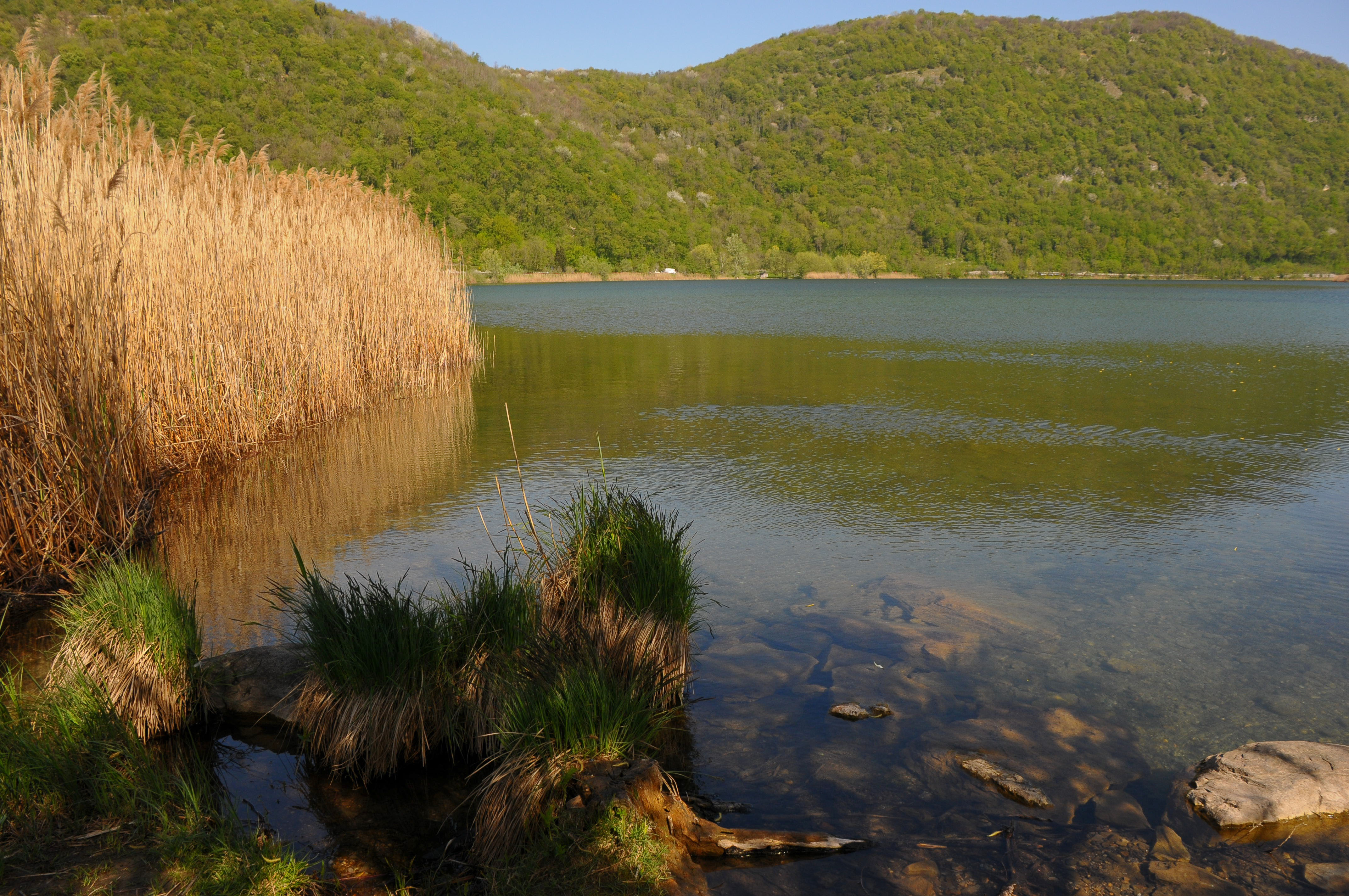 Uno scorcio del Lago del Segrino dalla riva occidentale